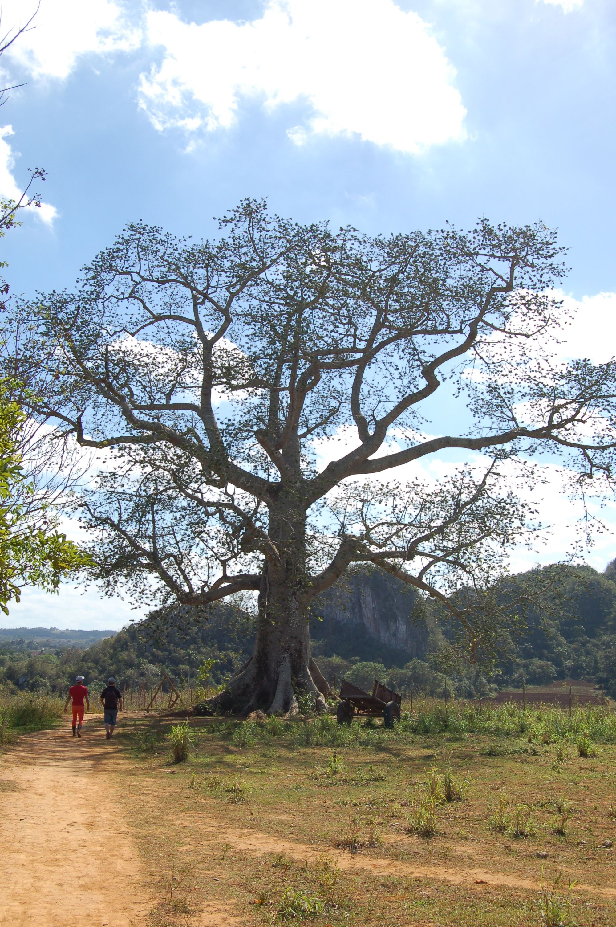 ceiba, qui est un arbre sacré pour la santería, dans la campagne de Viñales